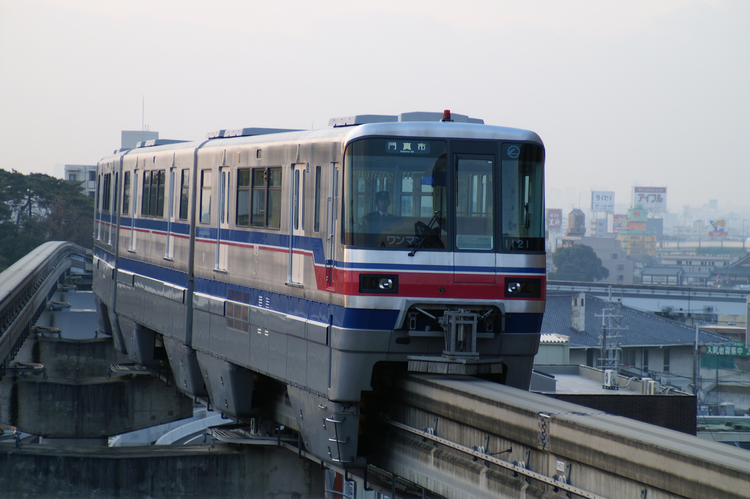 Osaka Monorail Train (1000 Series) at Hotarugaike Station, Toyonaka, Osaka, Japan 大阪モノレールの列車（1000系）、大阪府豊中市、蛍池駅